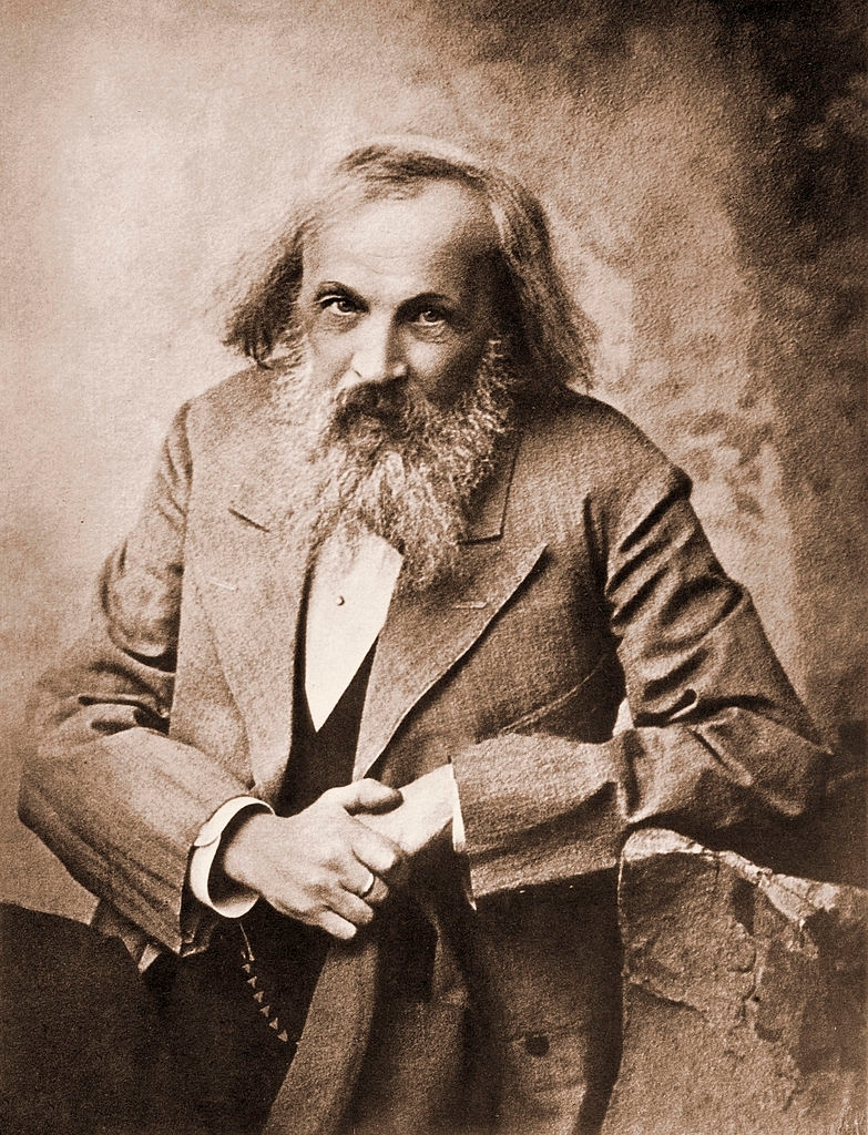 Dmitri Mendeleev